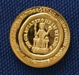 1000 Jährigs Bistumsjubiläum Bamberg